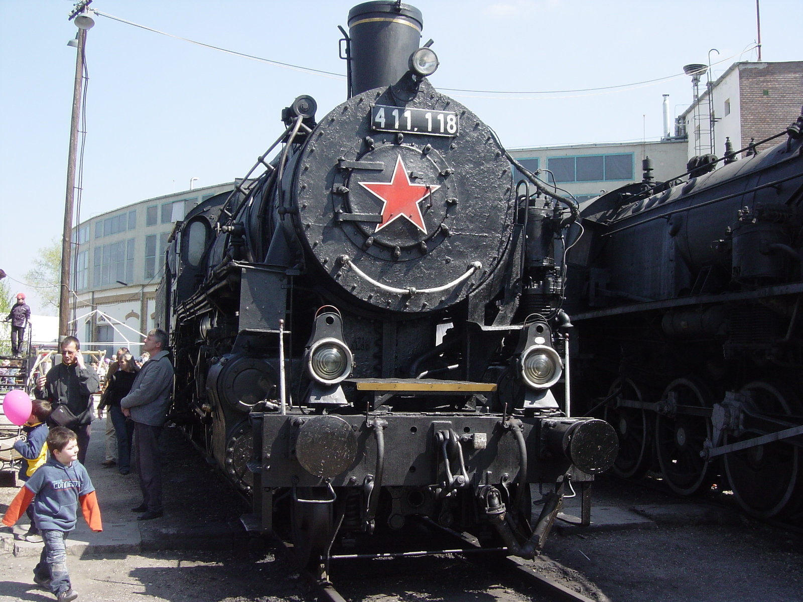 Vasúttörténeti Park